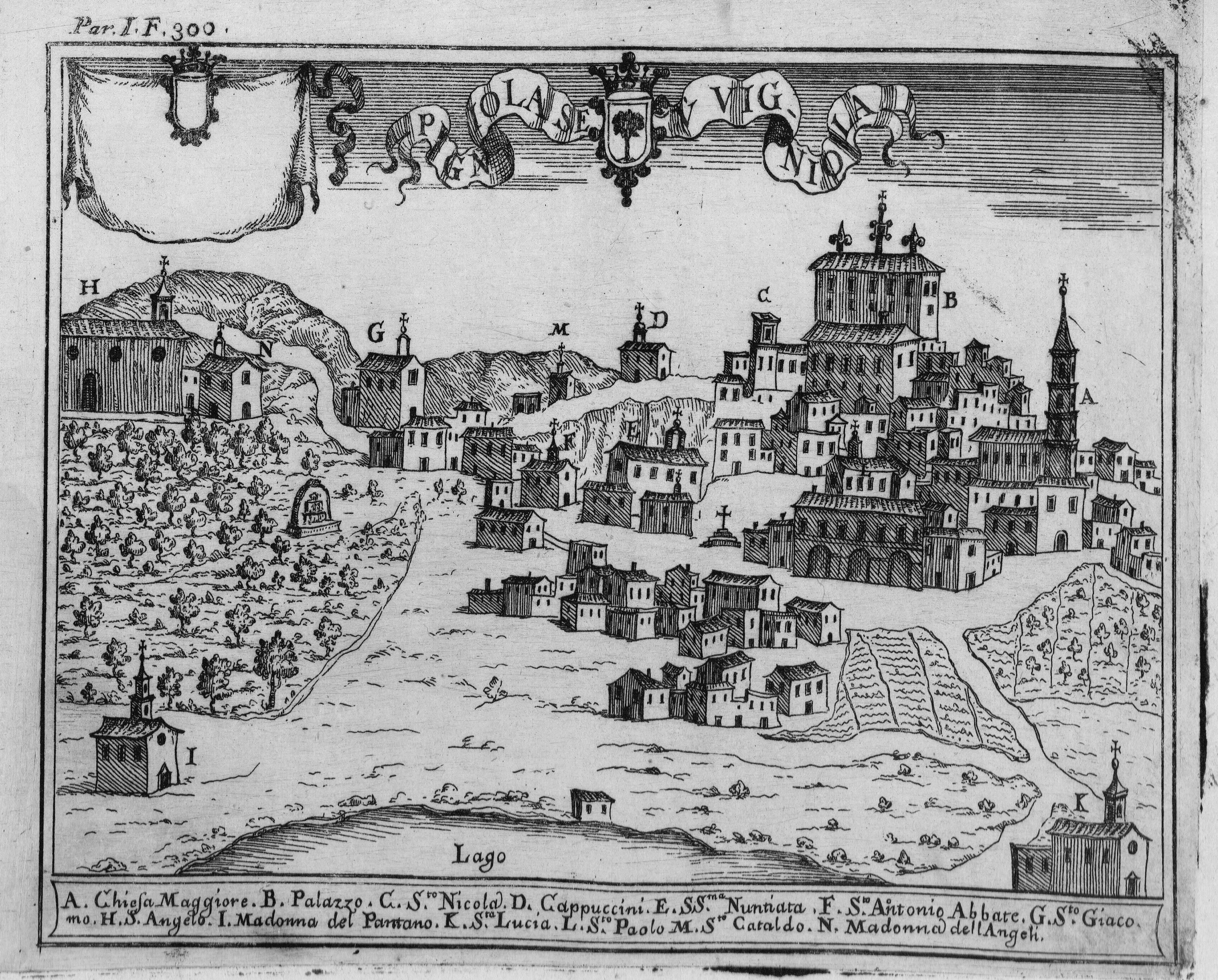 Autor: Pacichelli, Giovanni Battista, 1641-1702 Descripción bibliográfica: Il regno di Napoli in prospettiva : diviso in dodeci provincie, in cui si descrivono la sua Metropoli Fidelissima città di Napoli ... Opera postuma divisa in tre parti / dell'abatte Gio. Battista Pacichelli ; Parte prima [-terza] ... Del regno di Napoli in prospettiva / dell'abate Pacichelli. Parte prima. - In Napoli : nella Stamperia di Michele Luigi Mutio, 1703. - v. : principalmente il.; 4º . - Inic. adorn. y frisos dec. - Grab. calc. y h. pleg. grab. calc. de mapas de Cassianus de Silva. Ilustrador: Cassiano De Silva, Francesco, il. Impresor: Muzio, Michele Luigi, imp. Lugar de impresión: Italia. Nápoles Localización: Vea la ilustración en su contexto